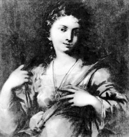 Sara Copia Sullam (1592 – 1641)